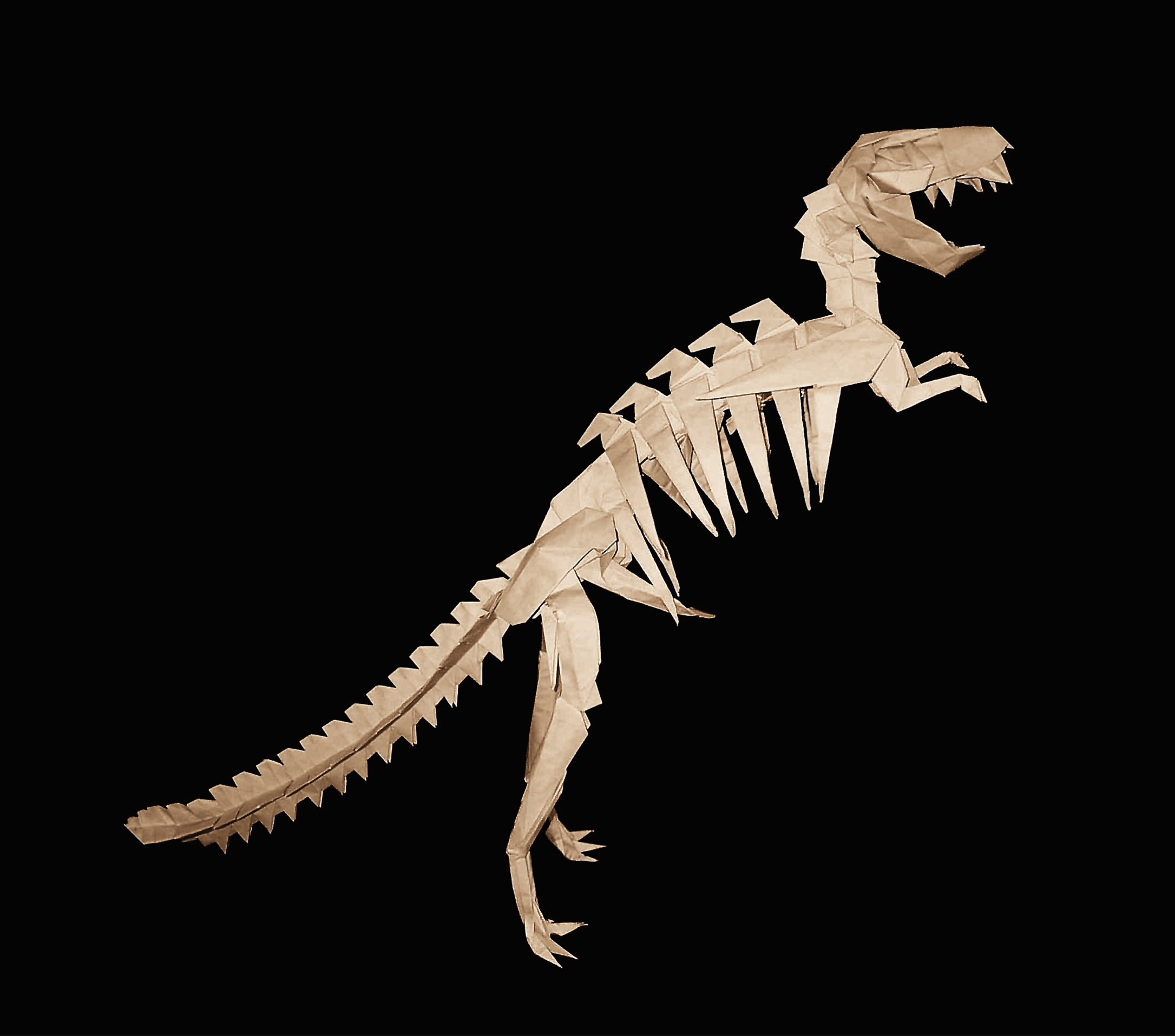 Esqueleto de T-Rex de papel.